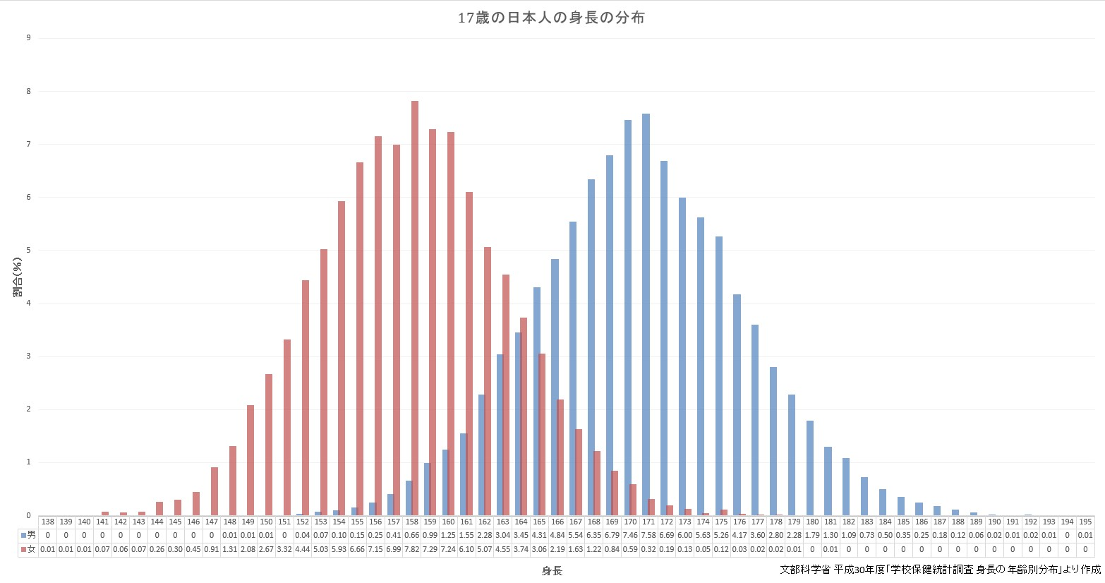 文部科学省の平成30年度「学校保健統計調査 身長の年齢別分布」より作成